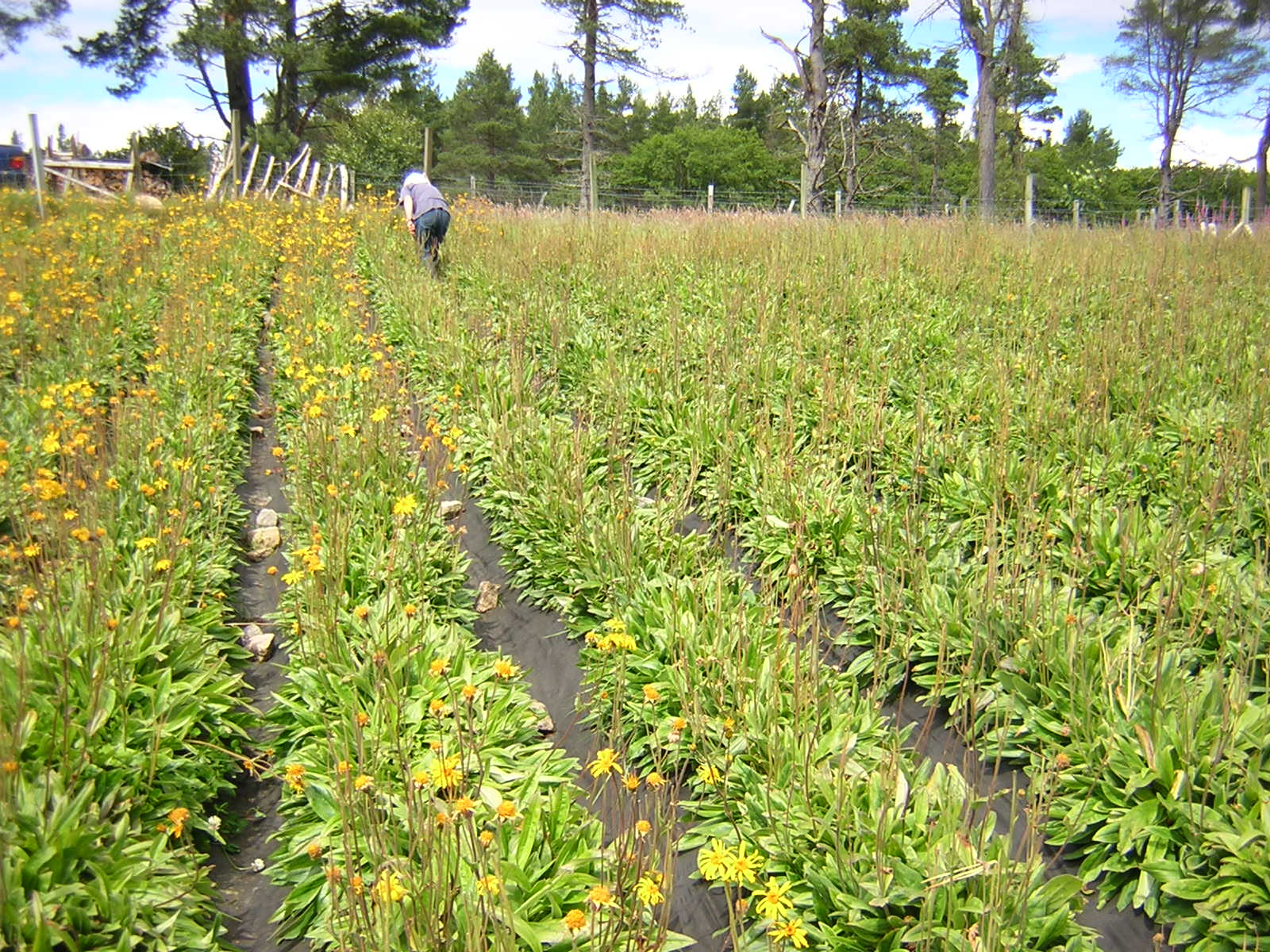 (en) Arnica montana field in Scotland (july 2004) (fr) exemple de culture de Arnica montana en Écosse (juillet 2004). Cette culture est située en Écosse, au nord d'Inverness à environ 150 m d'altitude. Cette culture d'Arnica montana fonctionne sous la forme d'une rotation culturale où pendant quatre années se récoltent quelques dizaines de kilogrammes de capitules secs sur chaque parcelles de 1000m². Cinq parcelles de cette taille ont ainsi un développement échelonné afin de permettre une production de plante entière annuelle d'environ 800 kg frais. Les plants sont cultivés sur des buttées de terre, recouvertes d'une bâche afin de limiter les adventices, avec un espacement d'environ 40 cm. Les plants de culture sont élancés et fins contrairement aux plants sauvages souvent trapus. Les capitules sont récoltés puis séchés, en laissant quelques fleurs pour la récolte des graines. Ces capitules récoltés sont destinés aux laboratoires pharmaceutiques, principalement Weleda.